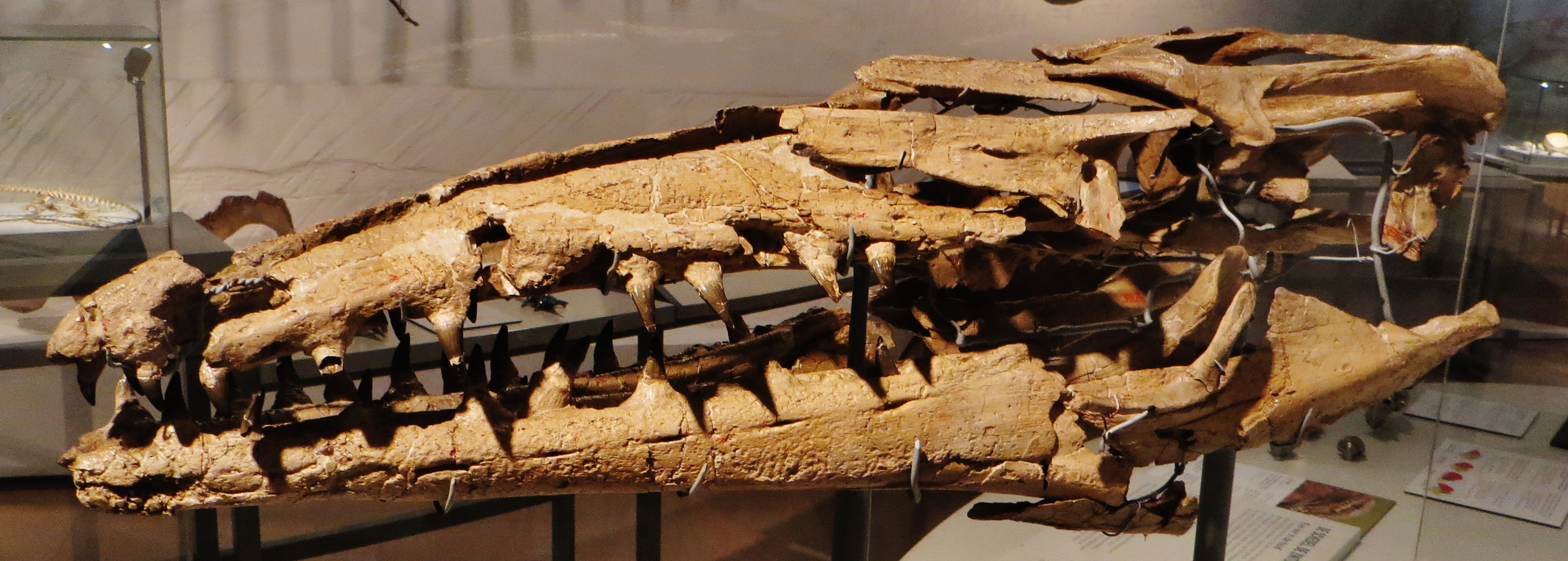 Fossil - Took The picture at Royal Belgian Institute of Natural Sciences, Brussels